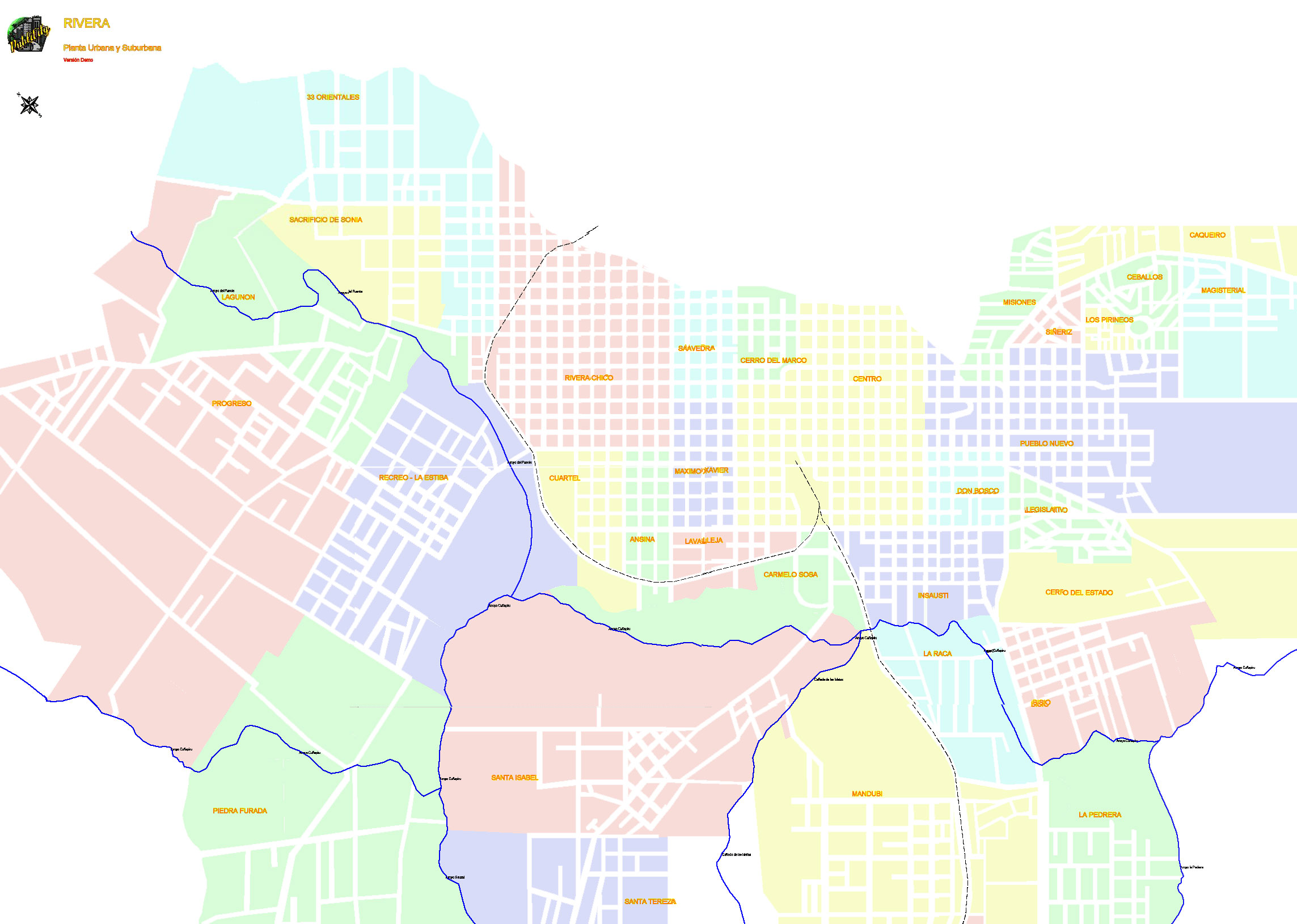 Mapa de Rivera - Barrios